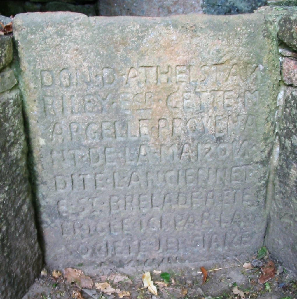 Nrf: Pits à La Hougue Bie, Jèrri